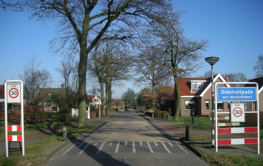 Oldeholtpade